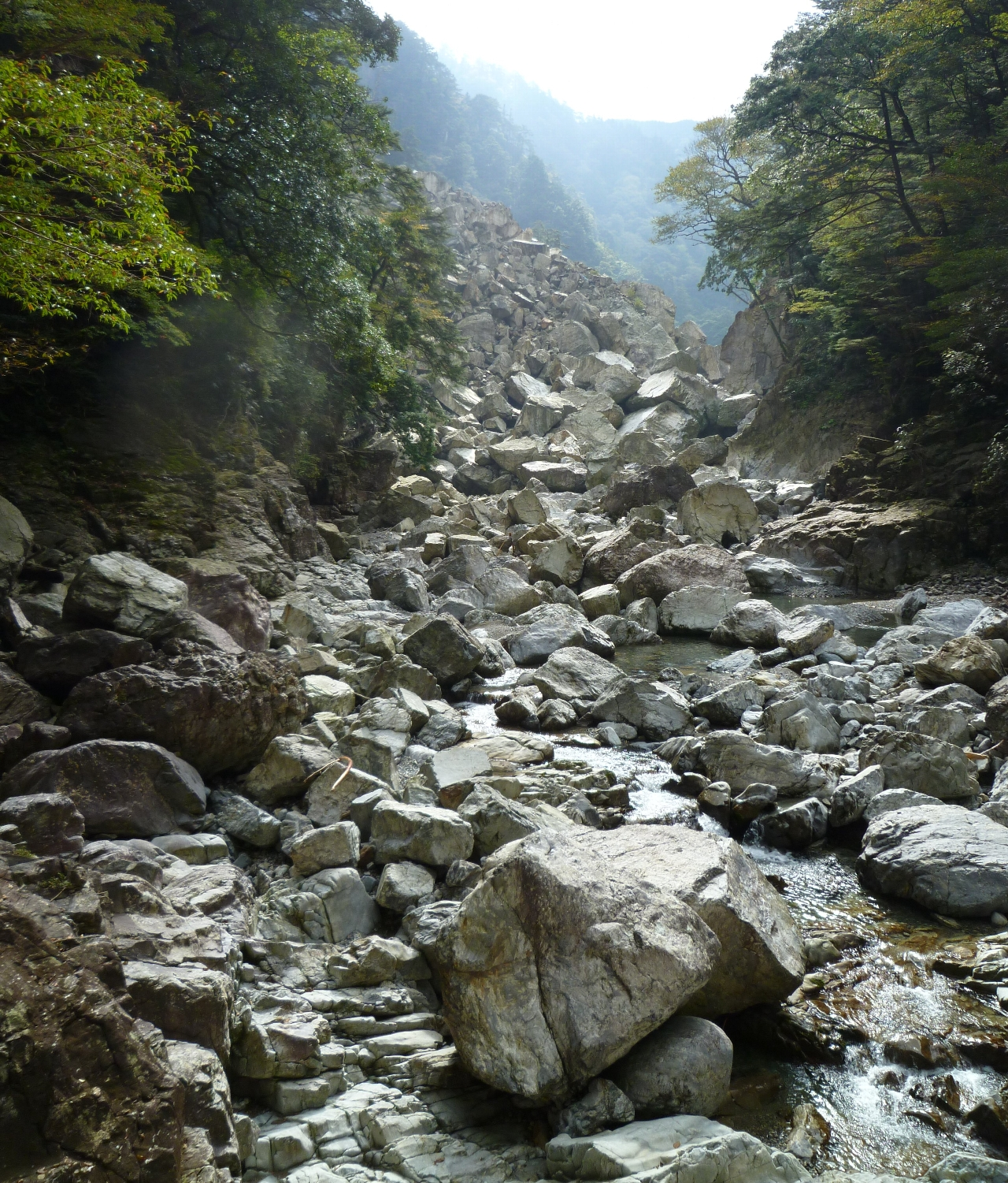 大杉谷。巨岩が積み重なる。奥の崩壊地は2004年の大雨で発生したもの。